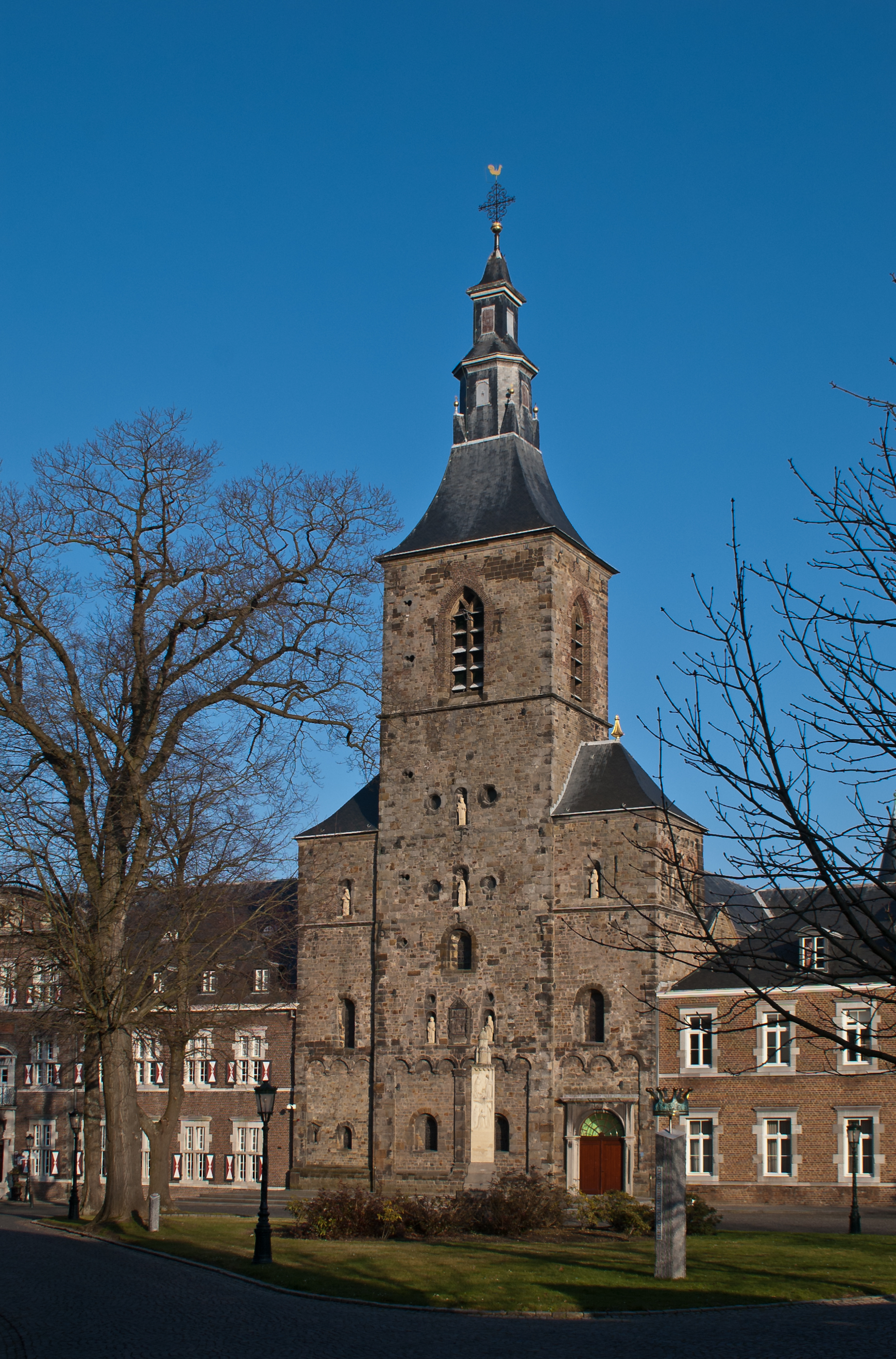 Das Westwerk der Klosterkirche des Klosters Rolduc in Kerkrade, Niederlande